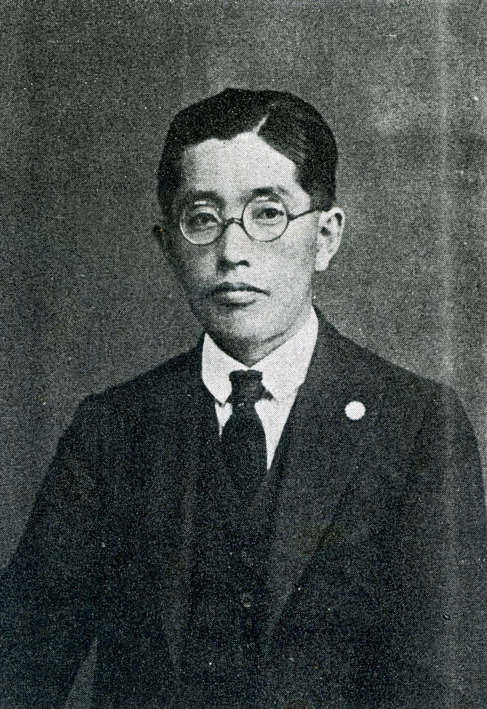 この写真は山本宣治(1889-1929)の1928年頃のものです。